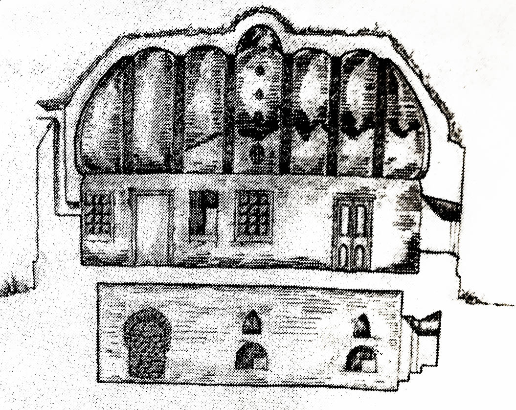 Gəncə şəhərindəki Ə. Hüseynzadə küçəsi 51 ünvanındakı günbəzli evin kəsimi